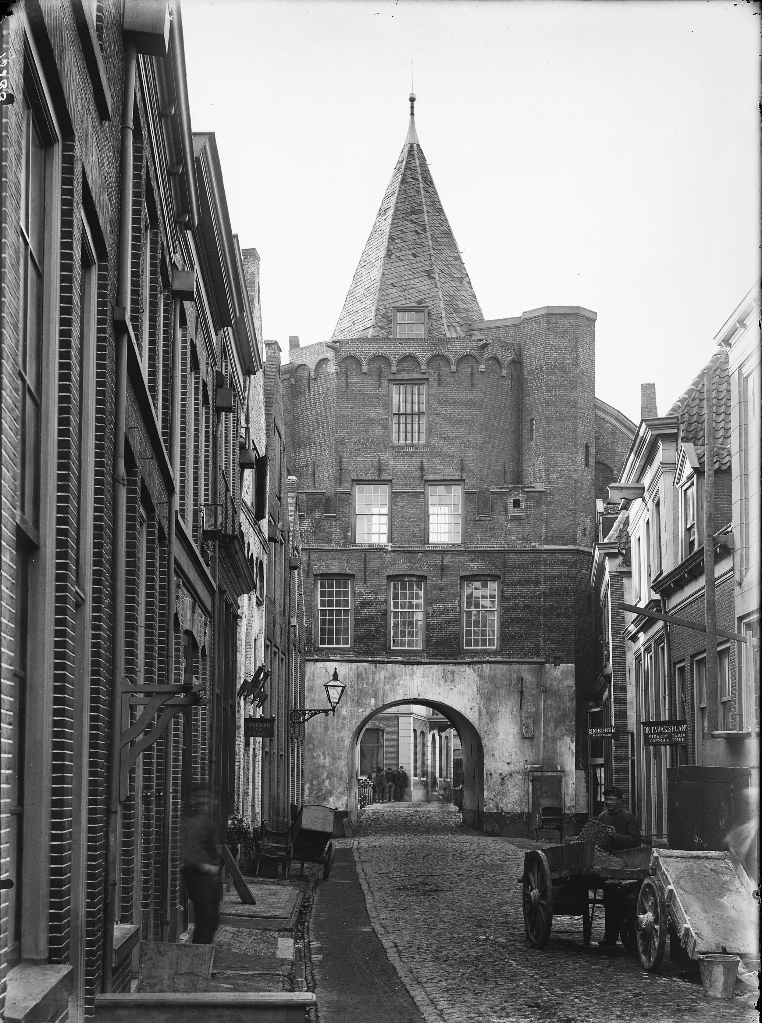 Hagenpoort: stadszijde